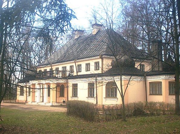 Dwór w Jasionnej (powiat sieradzki).